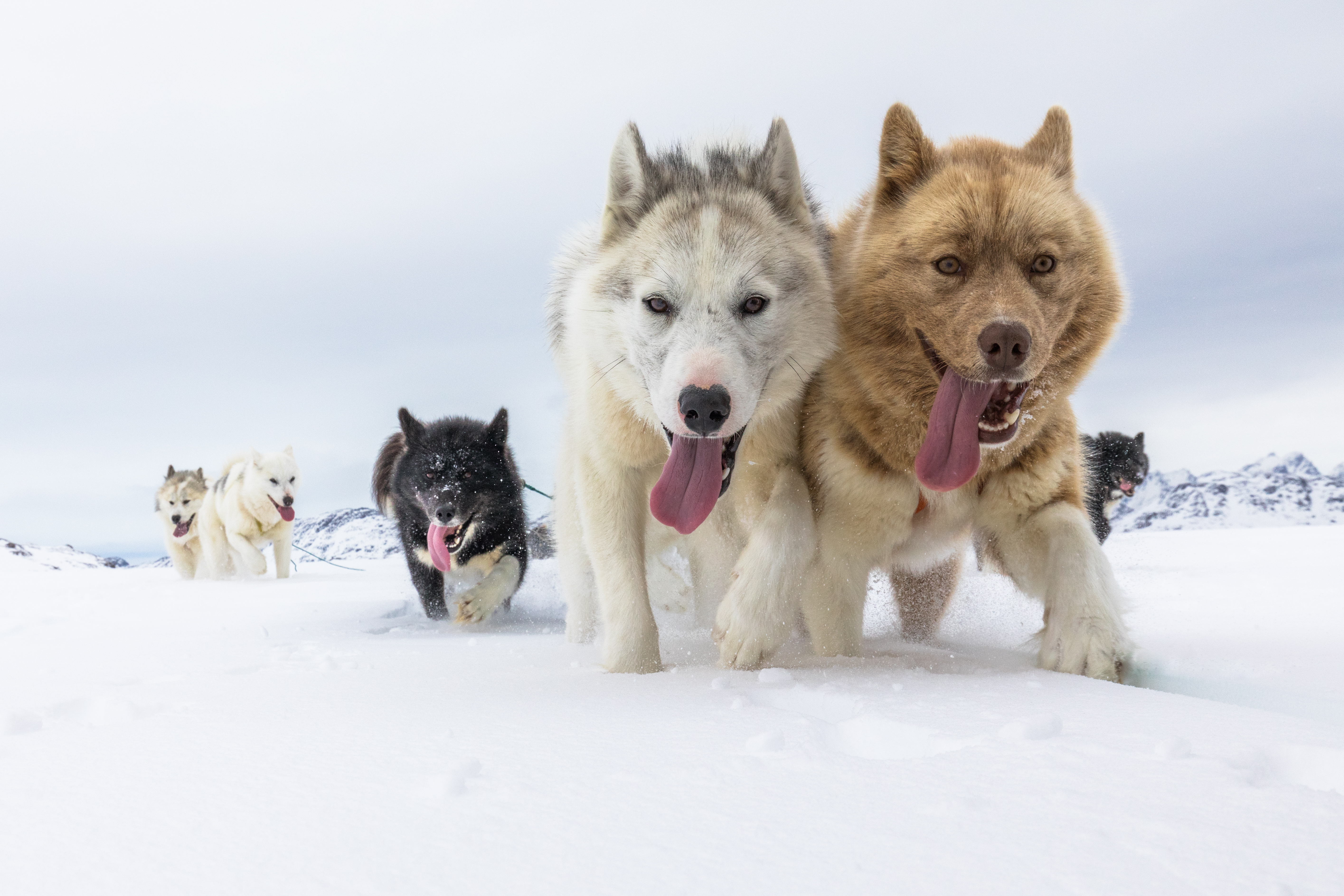 Huskies sled dogs in Kulusuk, Greenland.